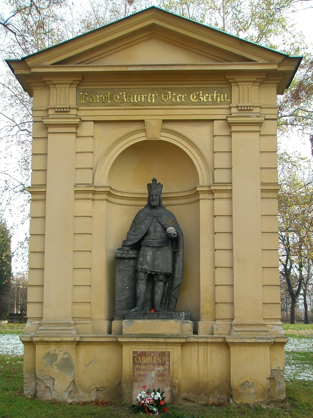 Socha Karla IV. od Josefa Maxe (1804–1855) v samostatně stojící kapličce v areálu na Karlově